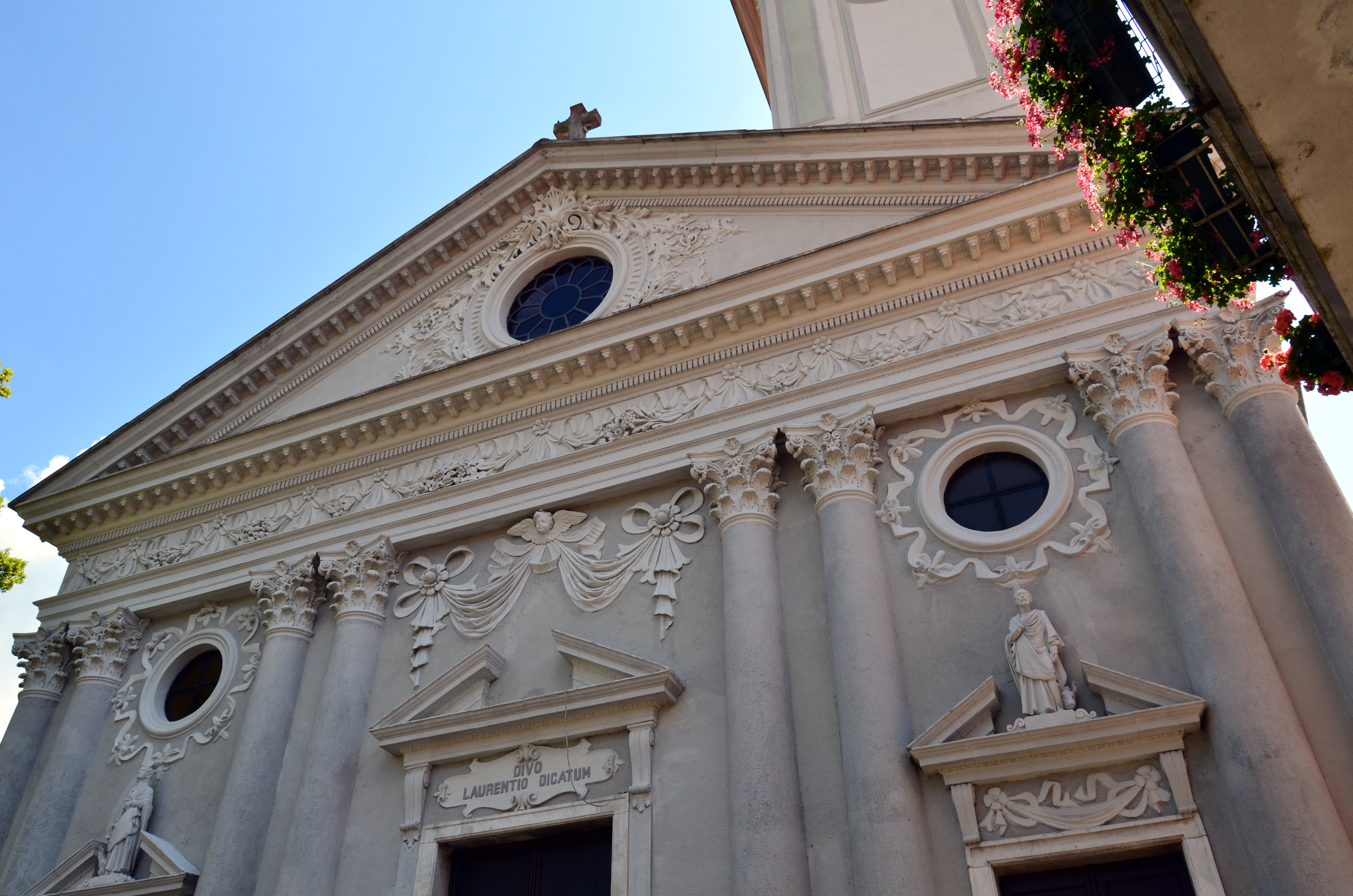 Serie di immagini della chiesa di San Lorenzo, Carro, Liguria, Italia